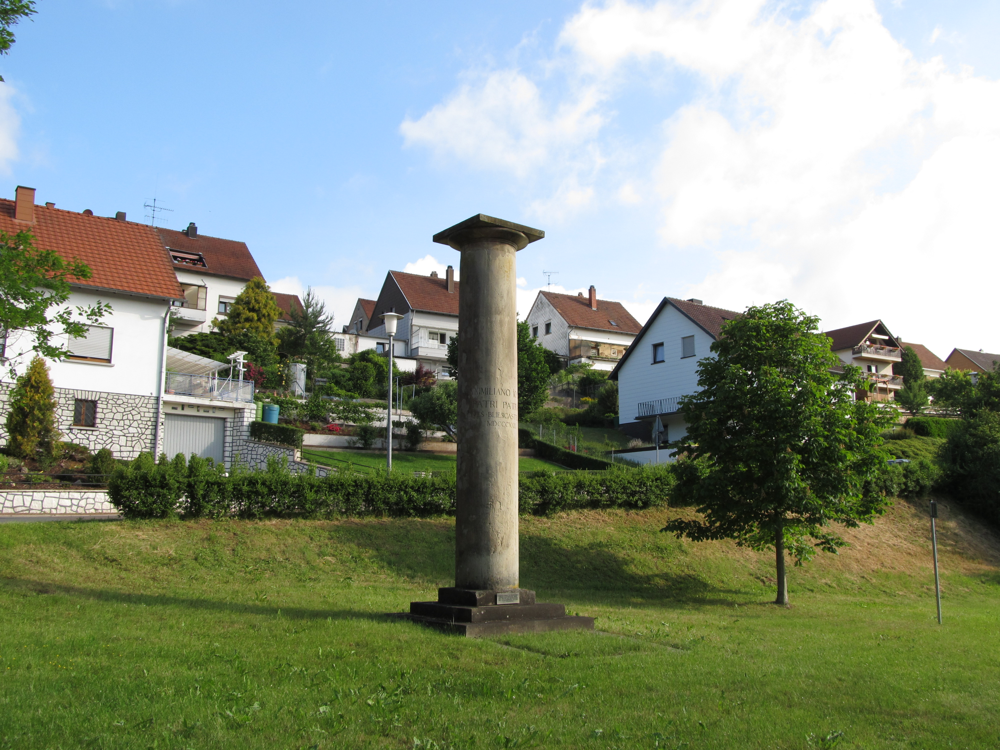 Die Maximiliansäule in Blieskastel, Saarland